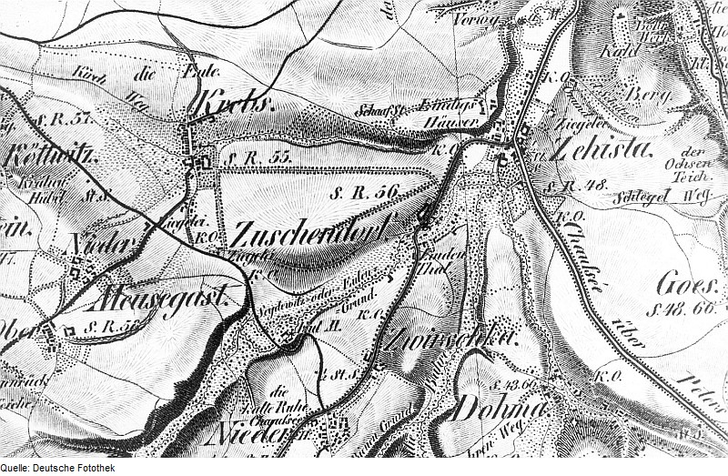 Original image description from the Deutsche FotothekPirna-Zuschendorf. Oberreit, Sect. Stolpen, 1821/22